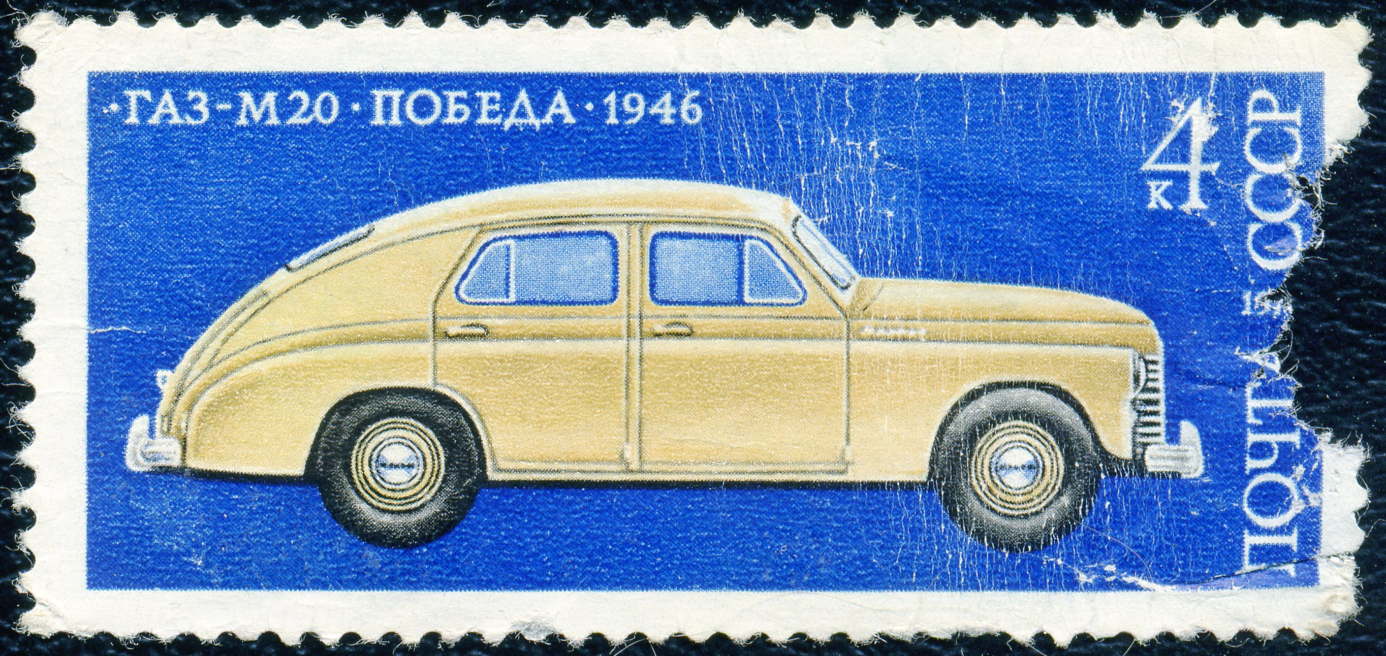 Почтовая марка СССР. Газ-М20 Победа. ЦФА #4580